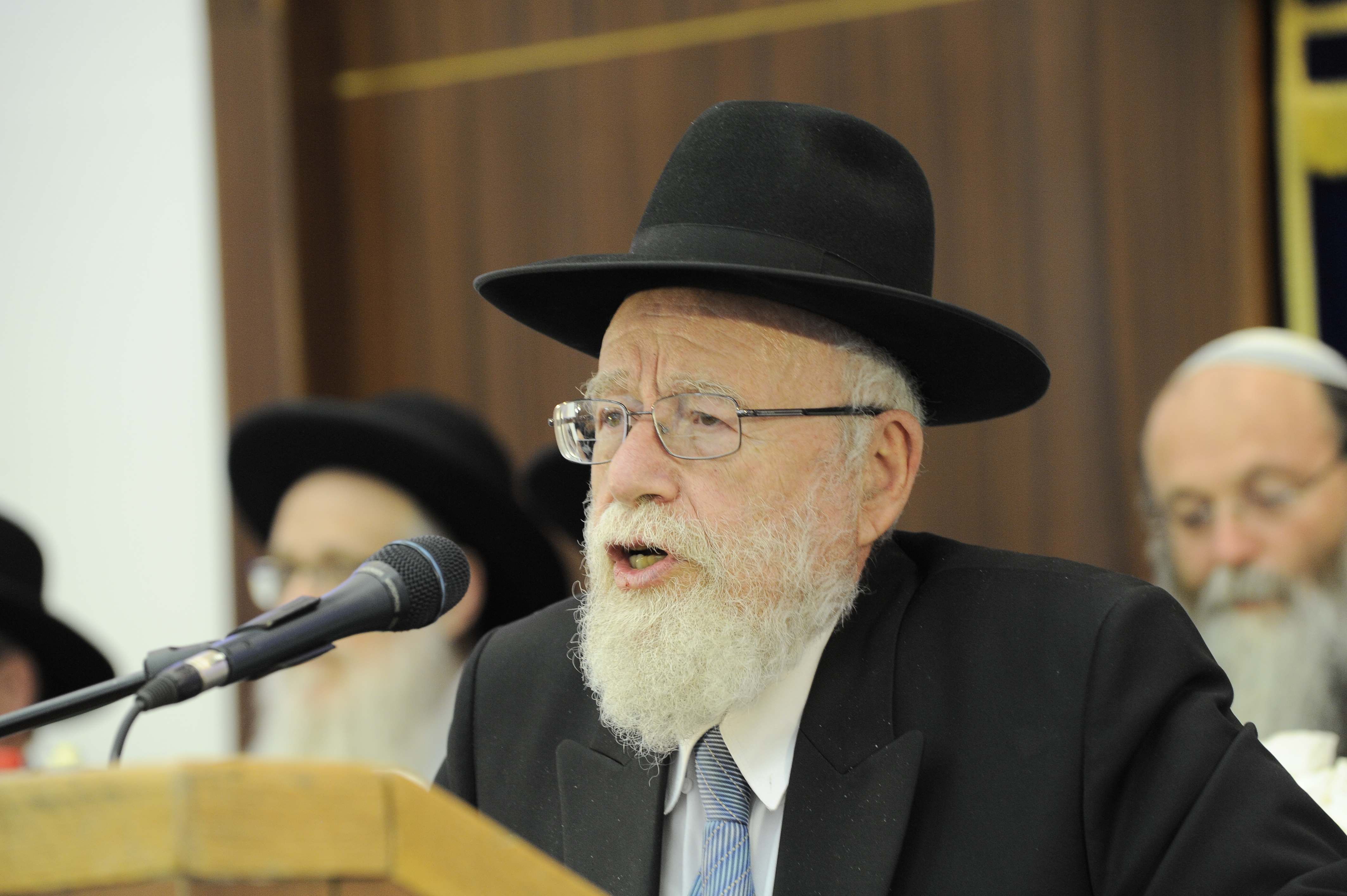 הרב דב ליאור נואם